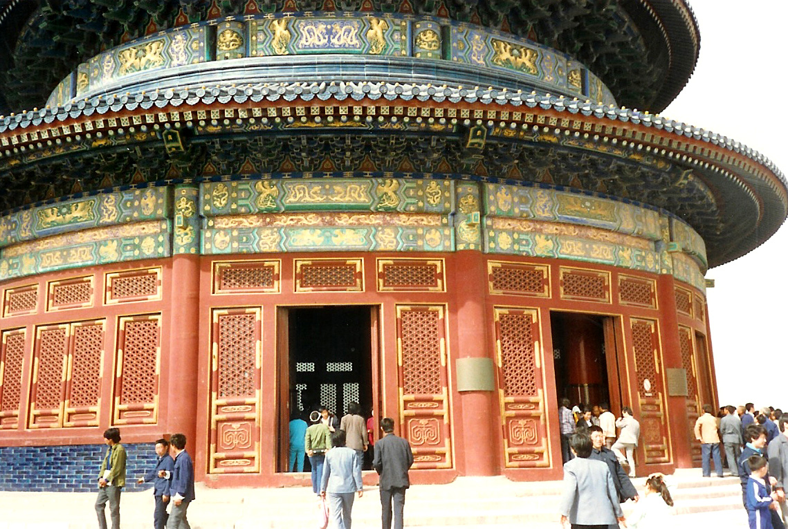 Verbuede Stad: Himmelstempel